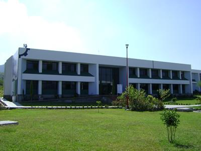 ITSUR remodelado